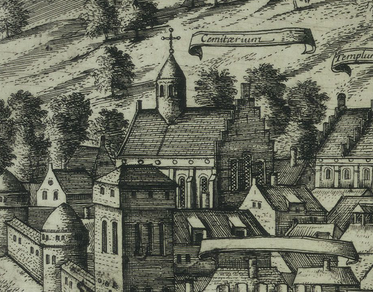 Церква святого Івана Хрестителя в Перемишлі на вигляді міста "Premislia celebris Rvssiae civitas". Збудована після 1535, розібрана у XVIII столітті.